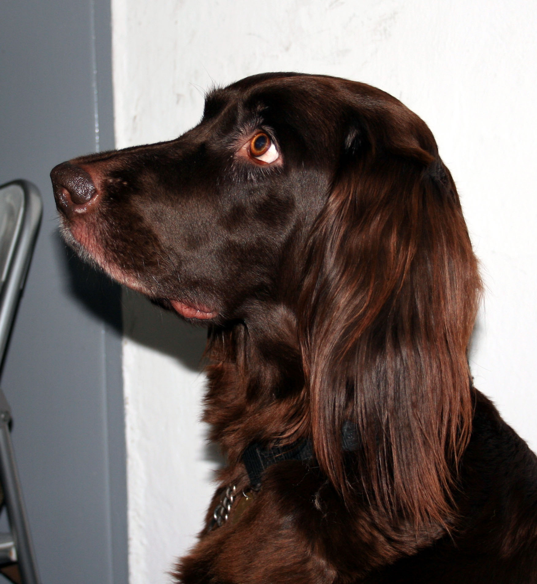 Wyżeł_niemiecki_długowłosy na Światowej Wystawie Psów Rasowych w Poznaniu